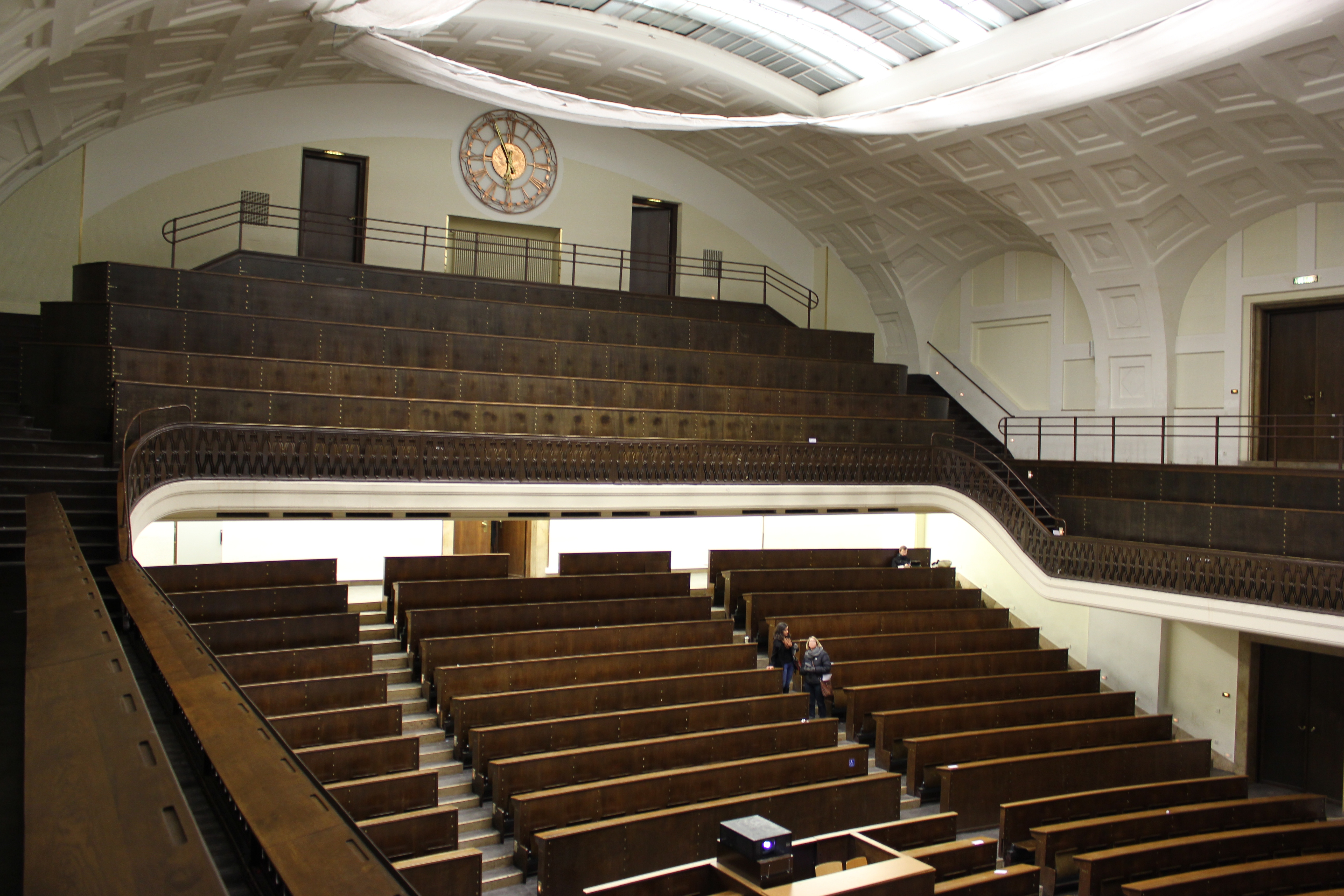 Audimax der Ludwig-Maximilians-Universität München